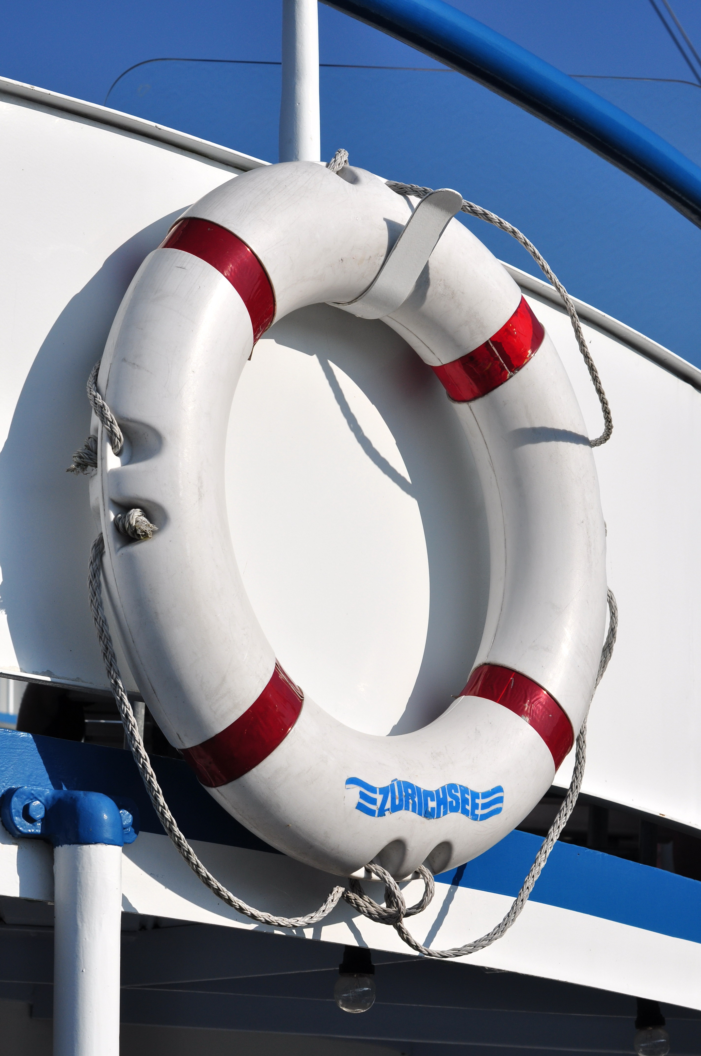 Zürichsee-Schiffahrtsgesellschaft (ZSG) paddle steamer Stadt Rapperswil